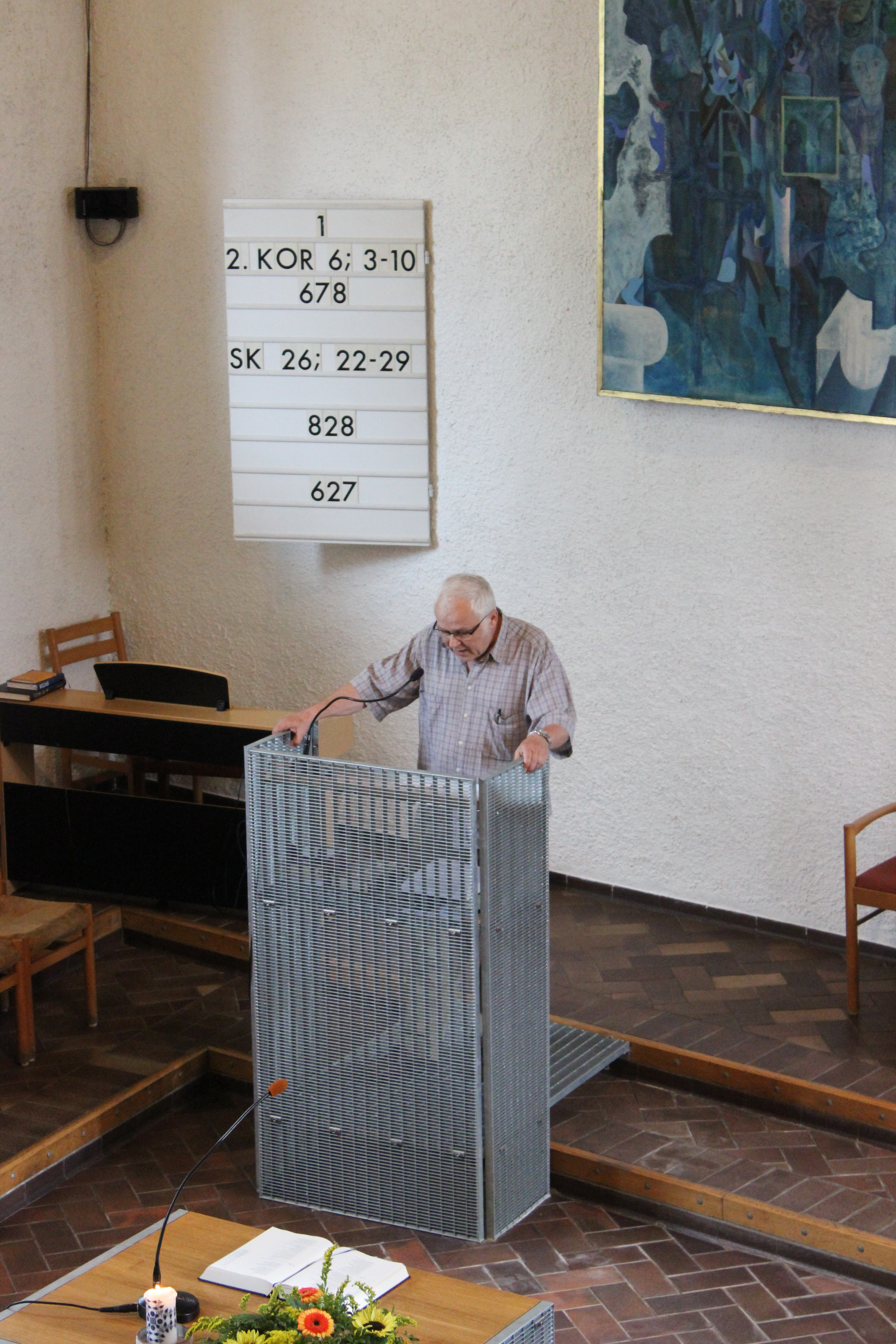 Bývalý kurátor sboru Jan Ratiborský během odpolední bohoslužby.